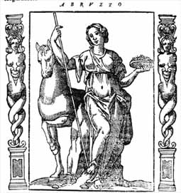 Cesare Ripa, Iconologia (inizio del sec. XVII), incisione, opera il cui autore è morto da più di 70 anni, acquisita da scanner